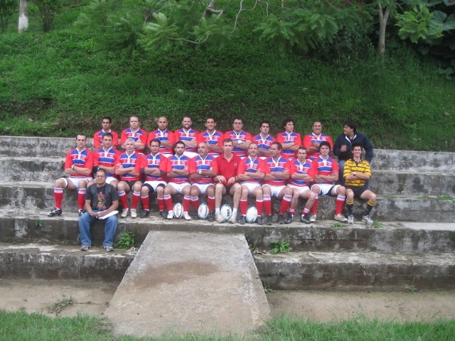 Fotografía de la Selección de Rugby de Costa Rica juego previo con Pegasus de Florida